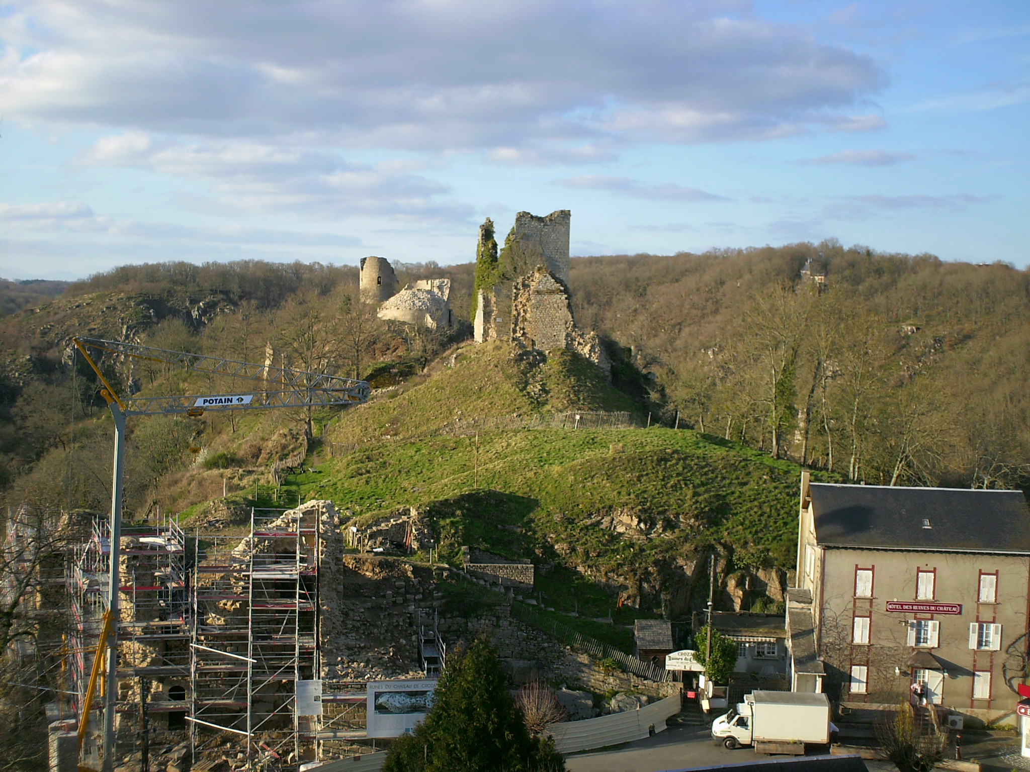 Château de Crozant en cours de travaux sur la porterie (vue depuis Chopeline, site de l'église et du cimetière mérovingien surplombant le château et les deux vallées de la Creuse et de la Sédelle)